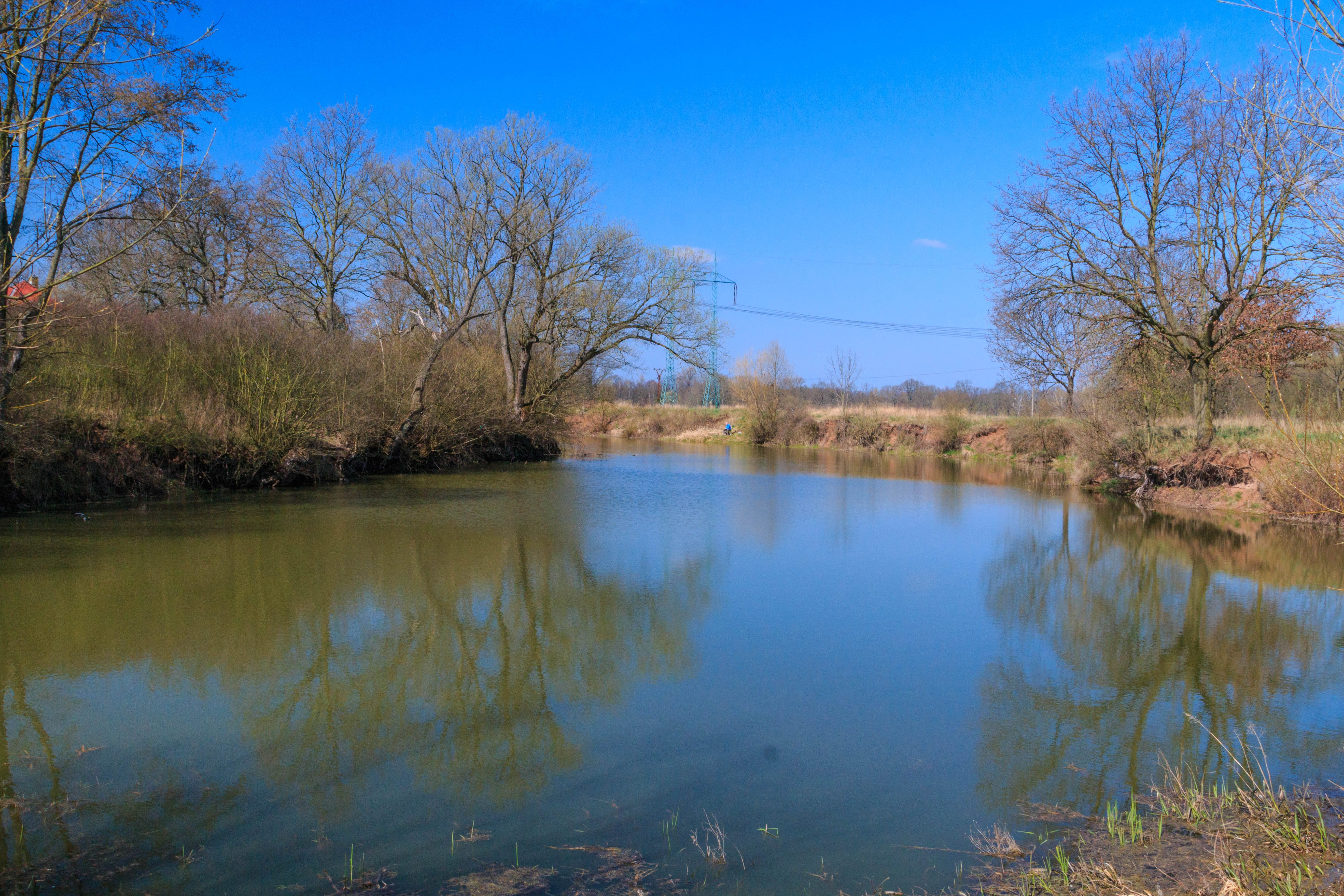 Rybník Tišina u Labětína Project: Vodstvo.